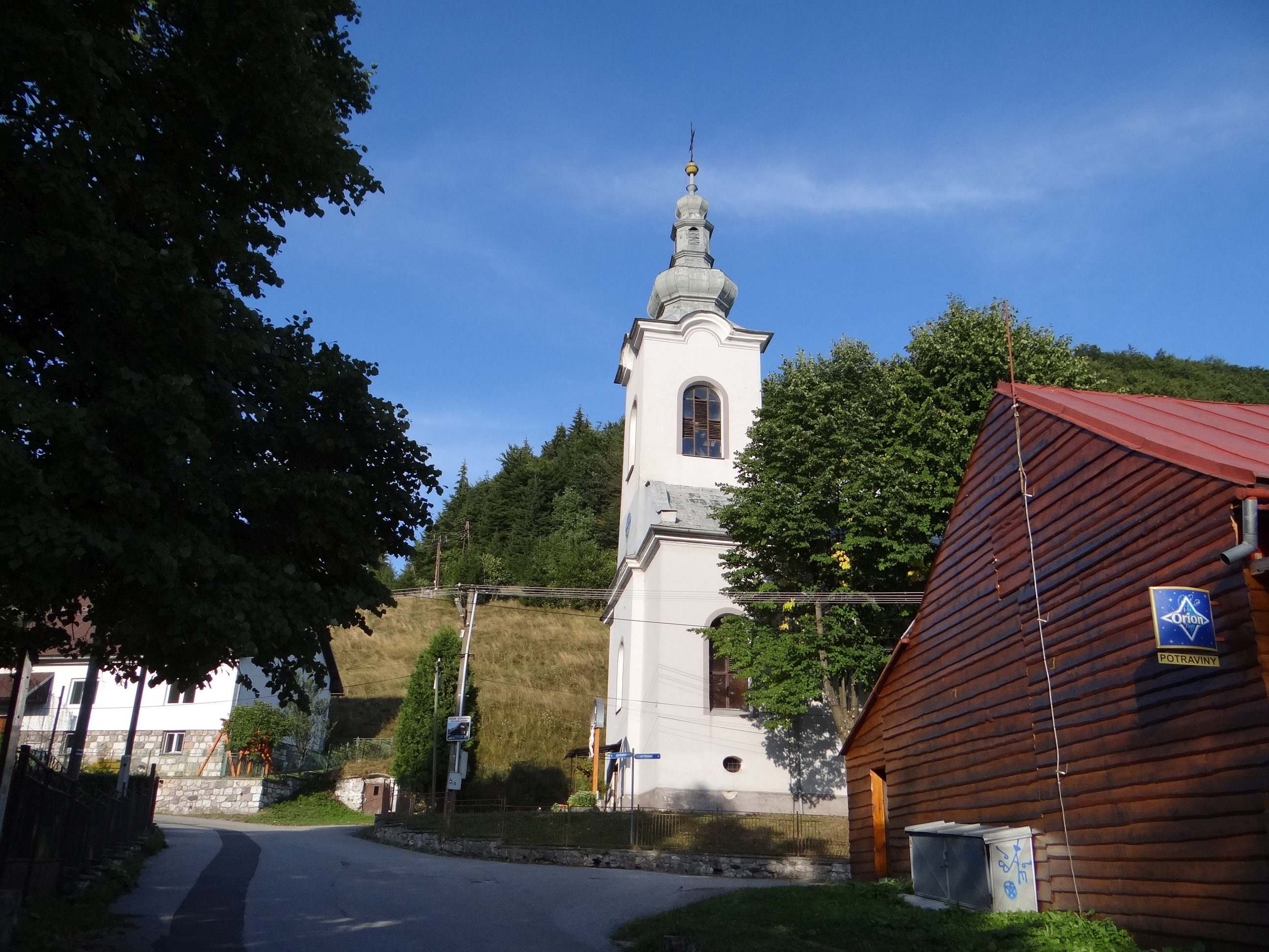 Dedinky